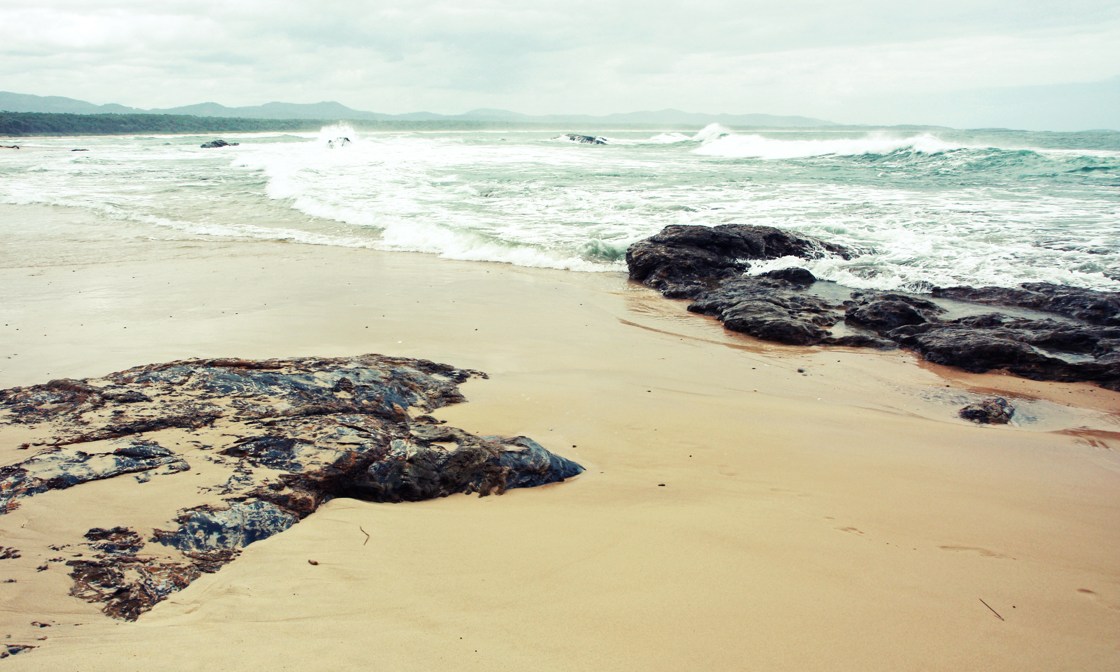 Bongil Bongil National Park